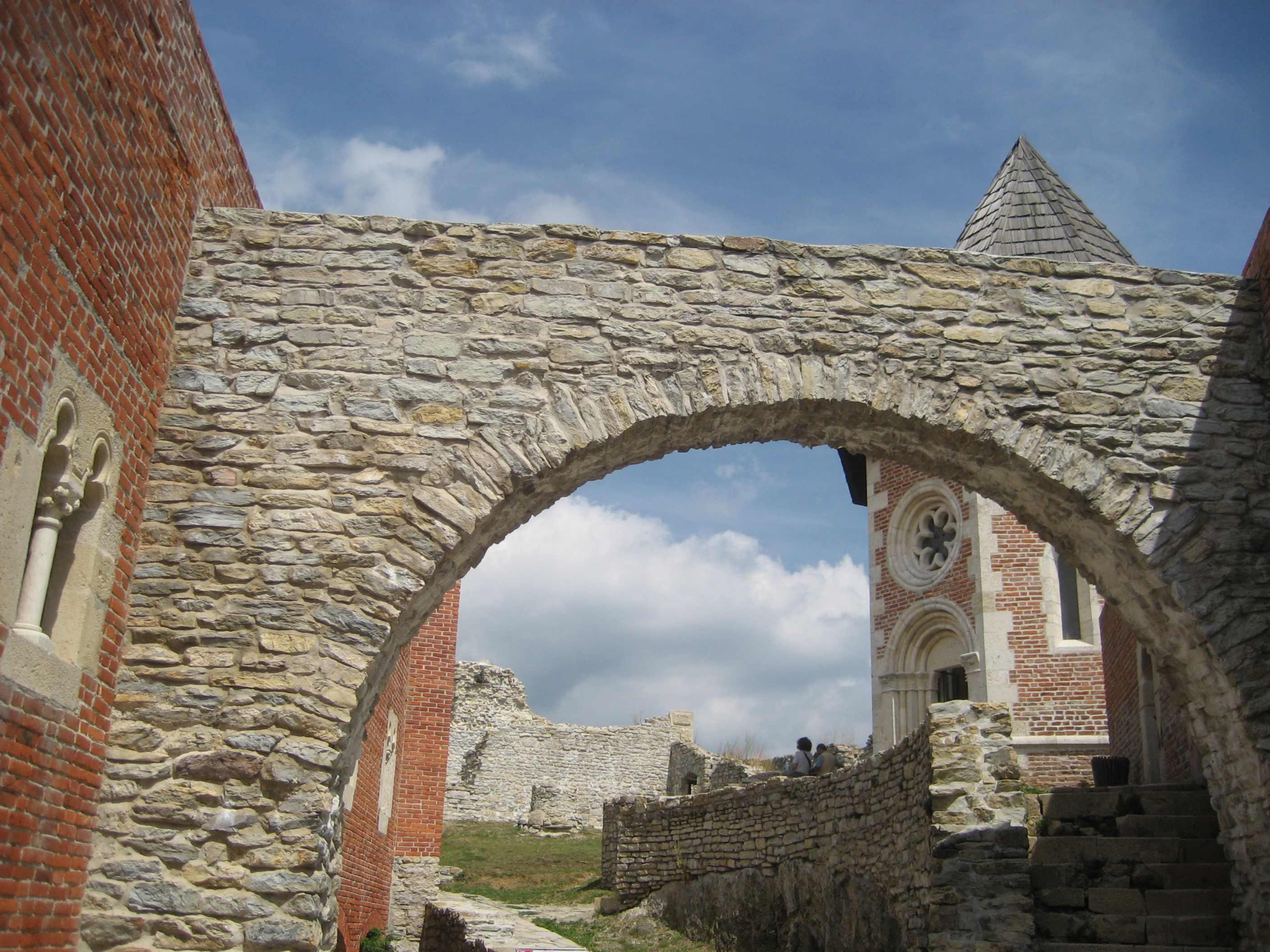 Medvedgrad2007